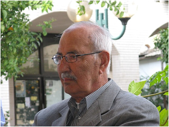 וליד חאג'-יחיא (ידוע גם בשם ווליד צאדק הוא איש ציבור ערבי-ישראלי, שכיהן כחבר הכנסת וכסגן שר.